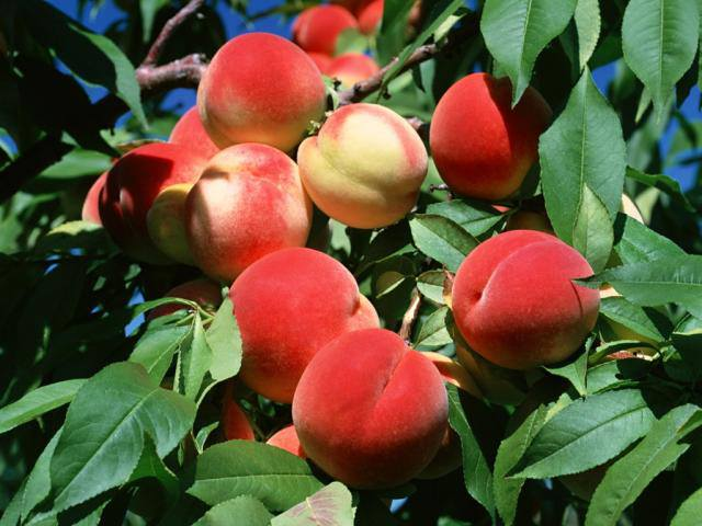 يعتبر الدراق من أهم منتجات قرصيتا